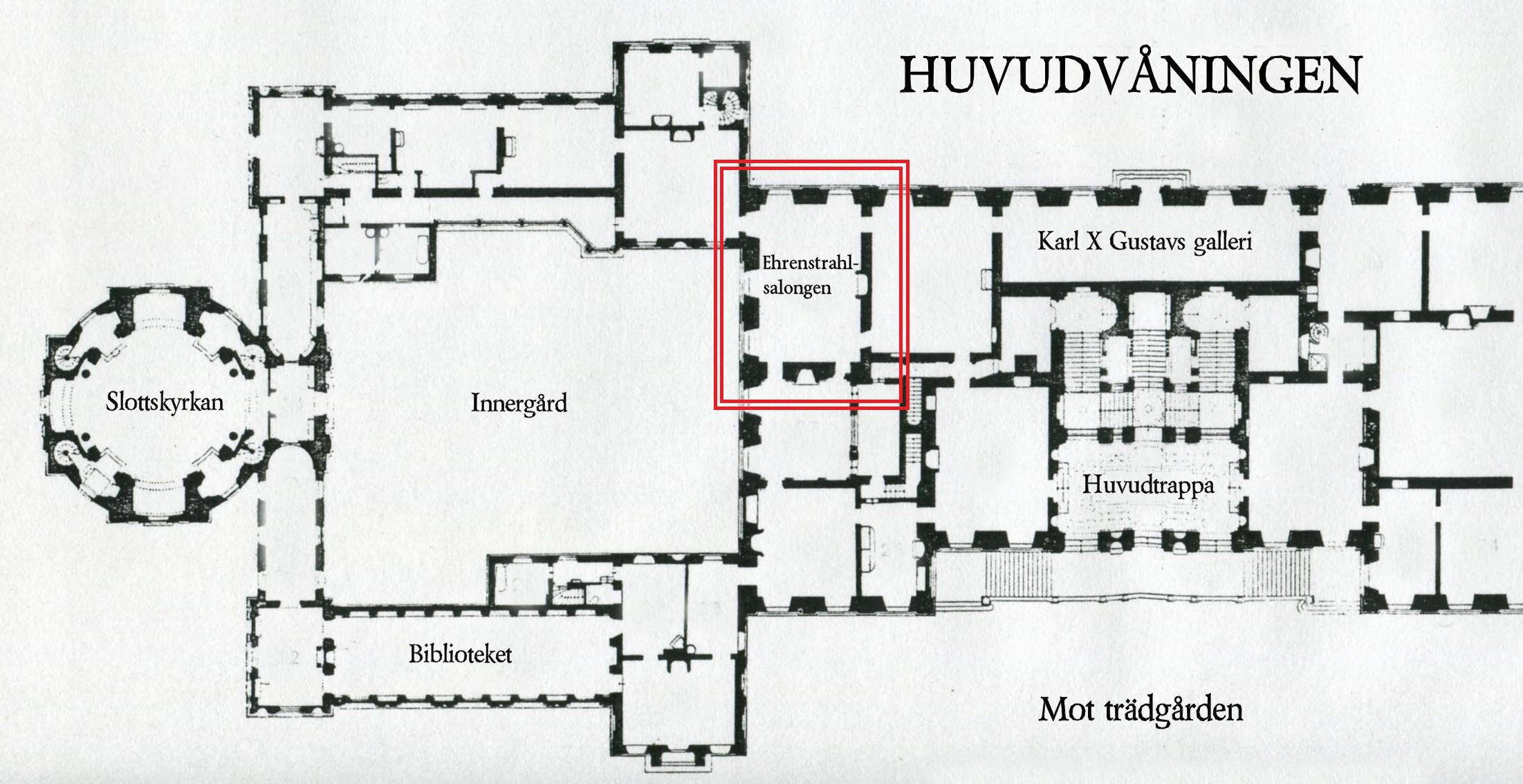 Drottningholms slott, planritning, huvudvåning, norra del, Ehrenstrahlsalongen (inom röd ram)